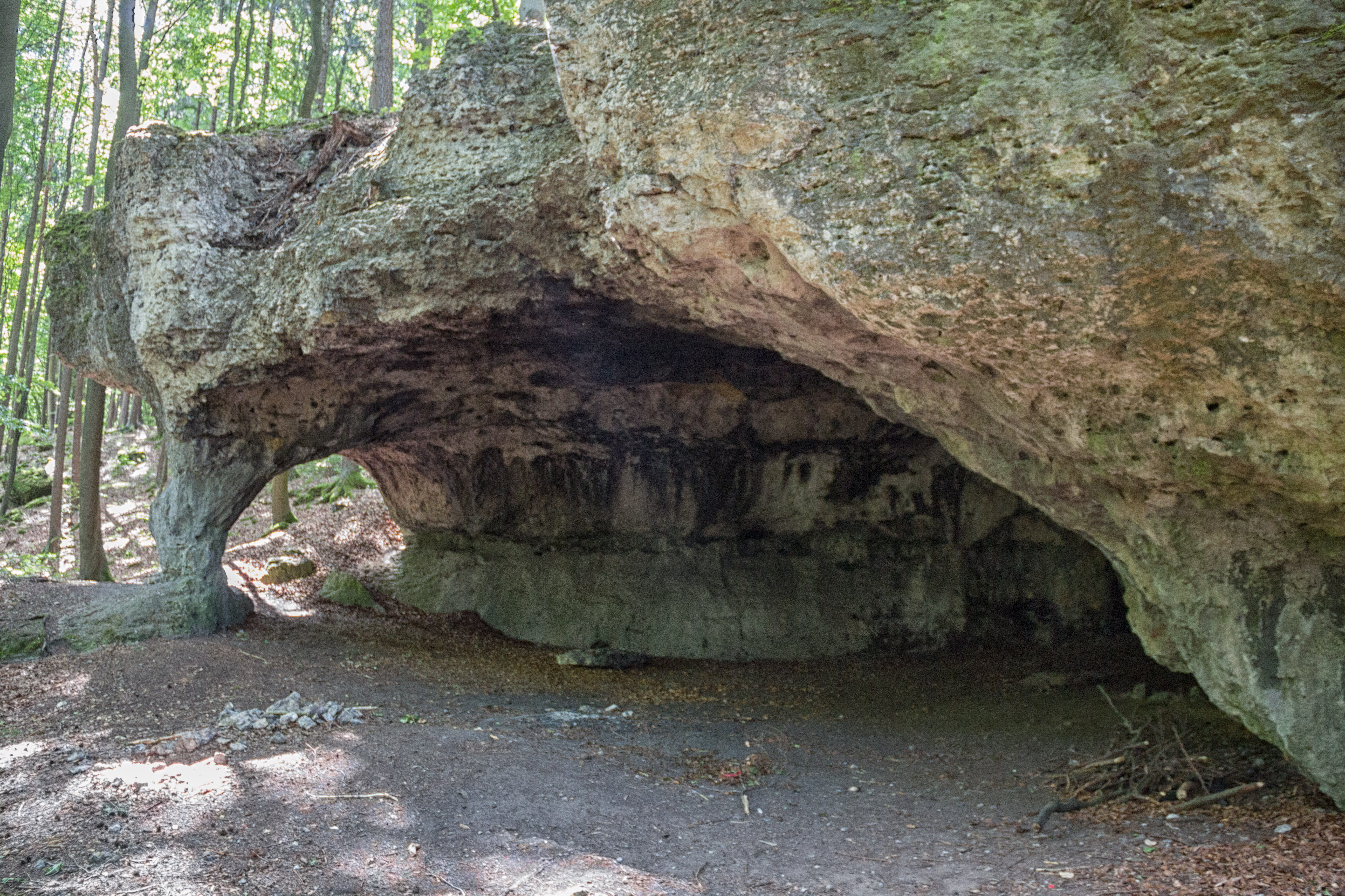 Geiskirche, Höhle, A 96, Naturpark Fränkische Schweiz-Veldensteiner Forst, Neukirchen bei Sulzbach-Rosenberg